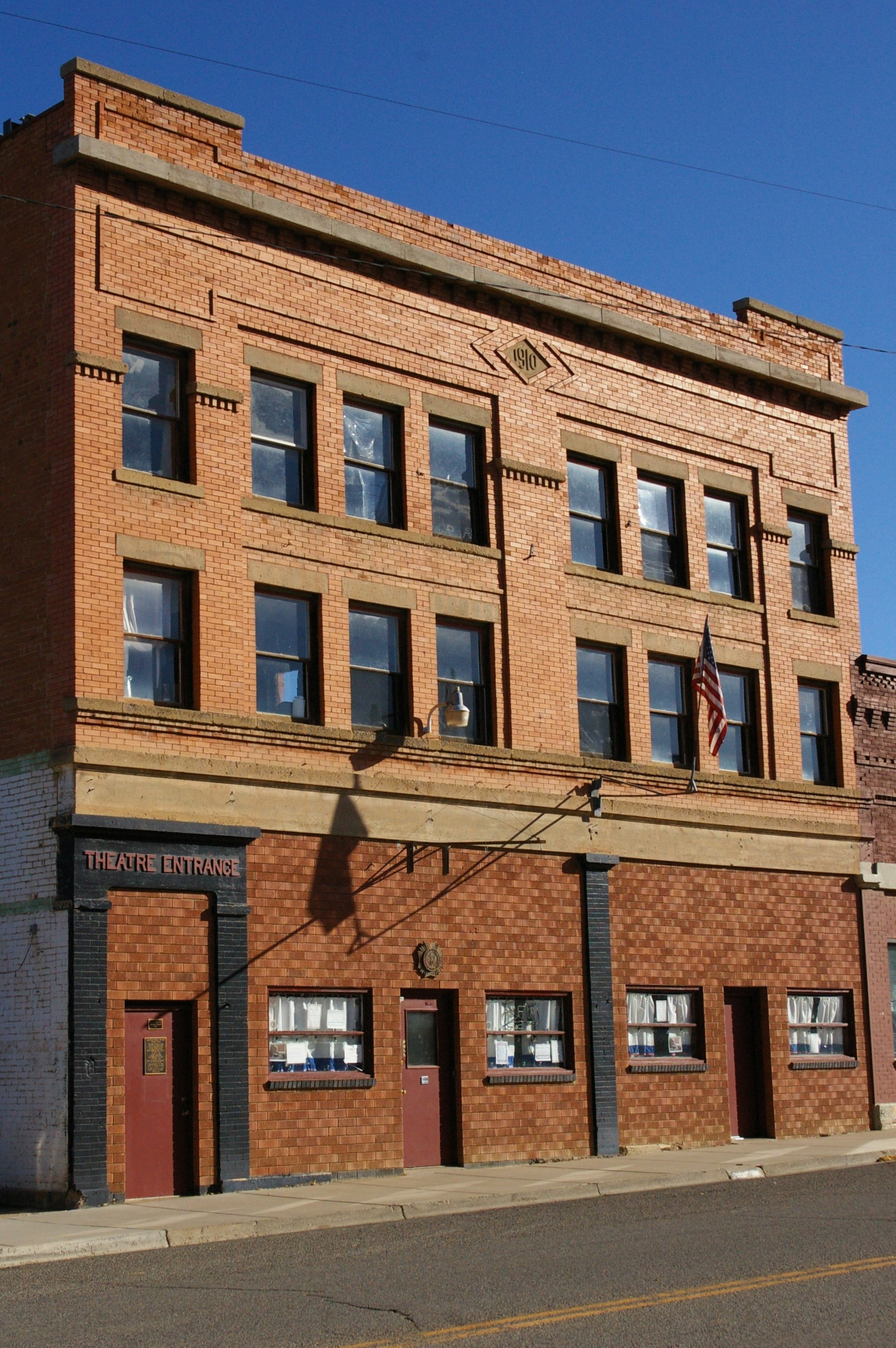 Mancos Opera House